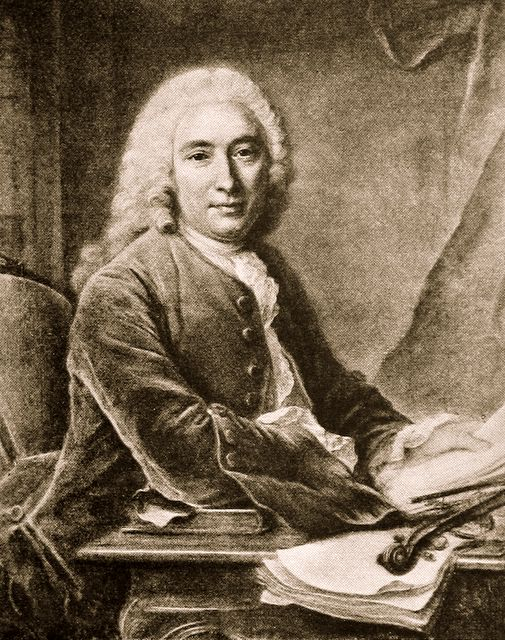 Portrait d'André Cardinal Destouches (1673-1749). André Cardinal, dit Destouches, compositeur français de la période baroque.